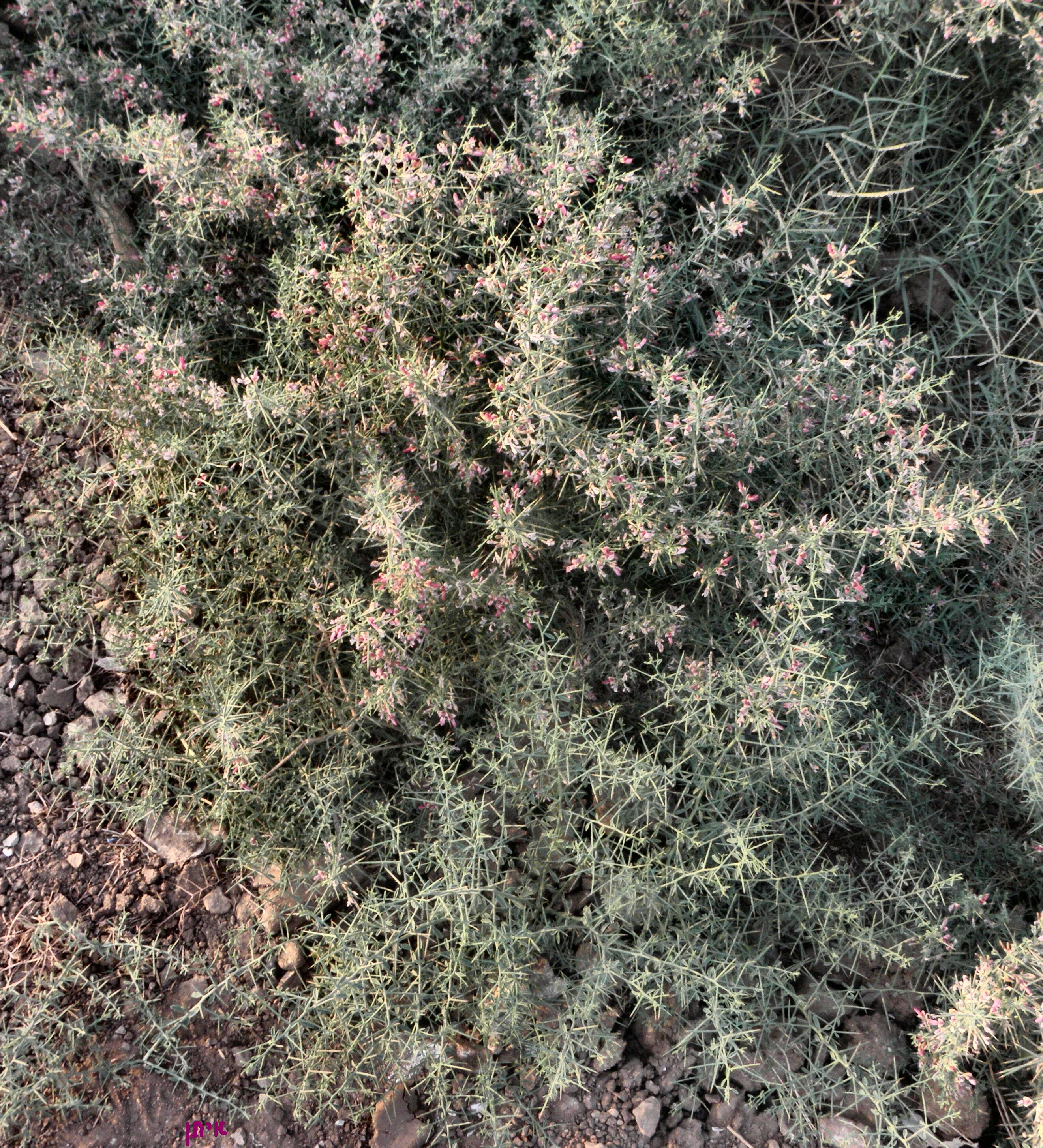 Alhagi maurorum bush הִגֵה מצוי